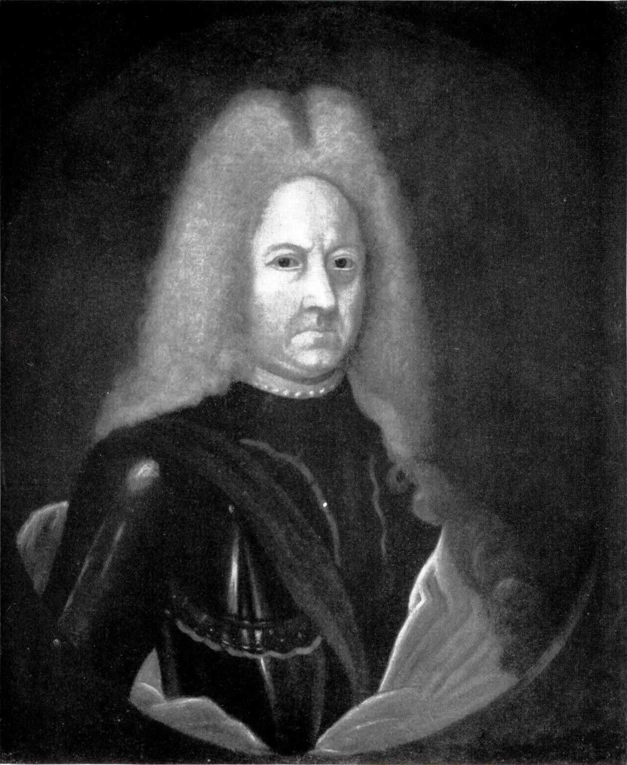 Jost Volprecht Riedesel Freiherr zu Eisenbach (1578-1632), 19. Erbmarschall von Hessen